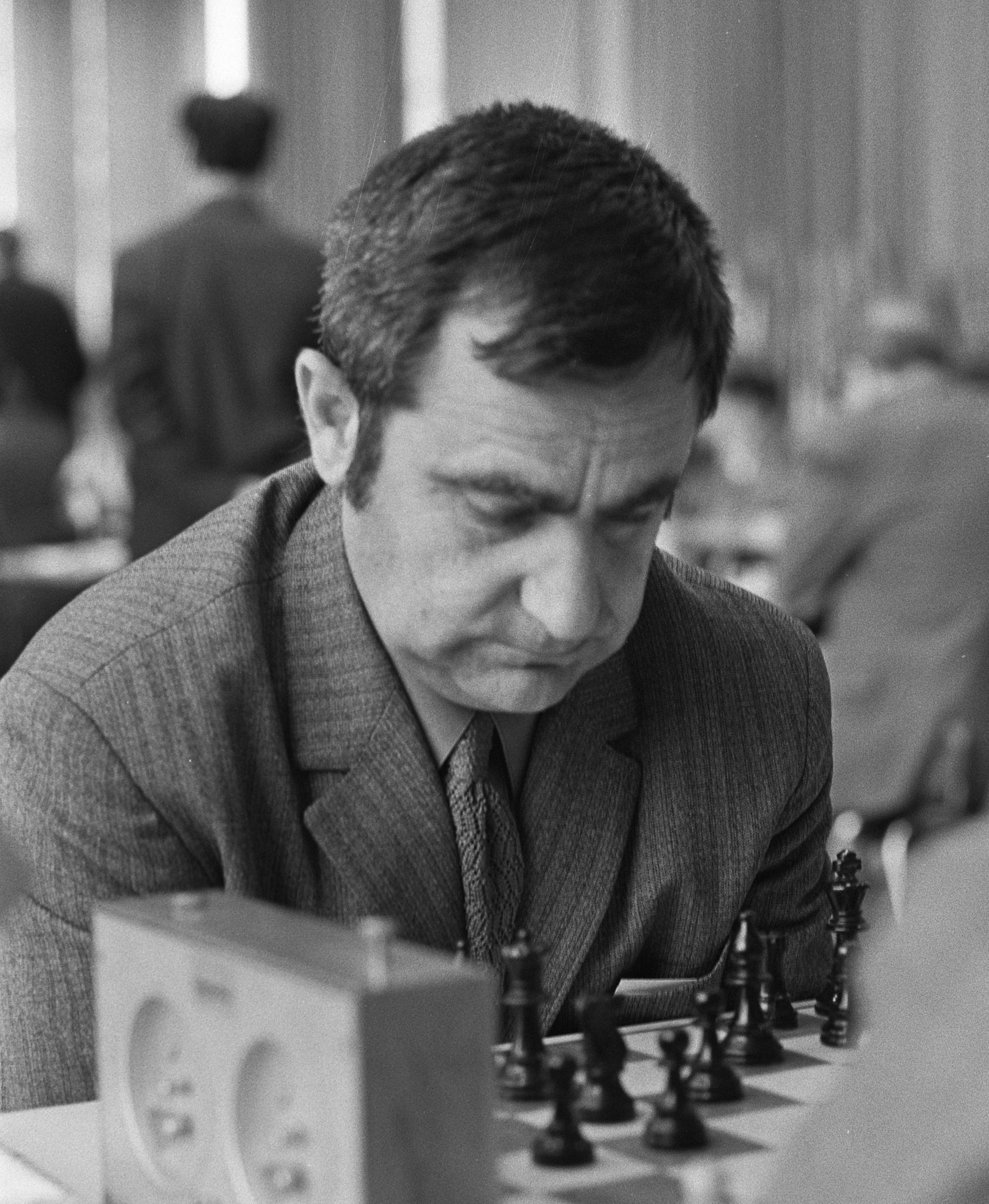 Nikola Padevsky